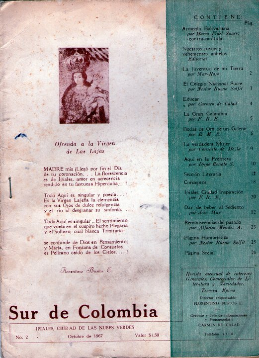 Portada de la revista Sur de Colombia, 1967